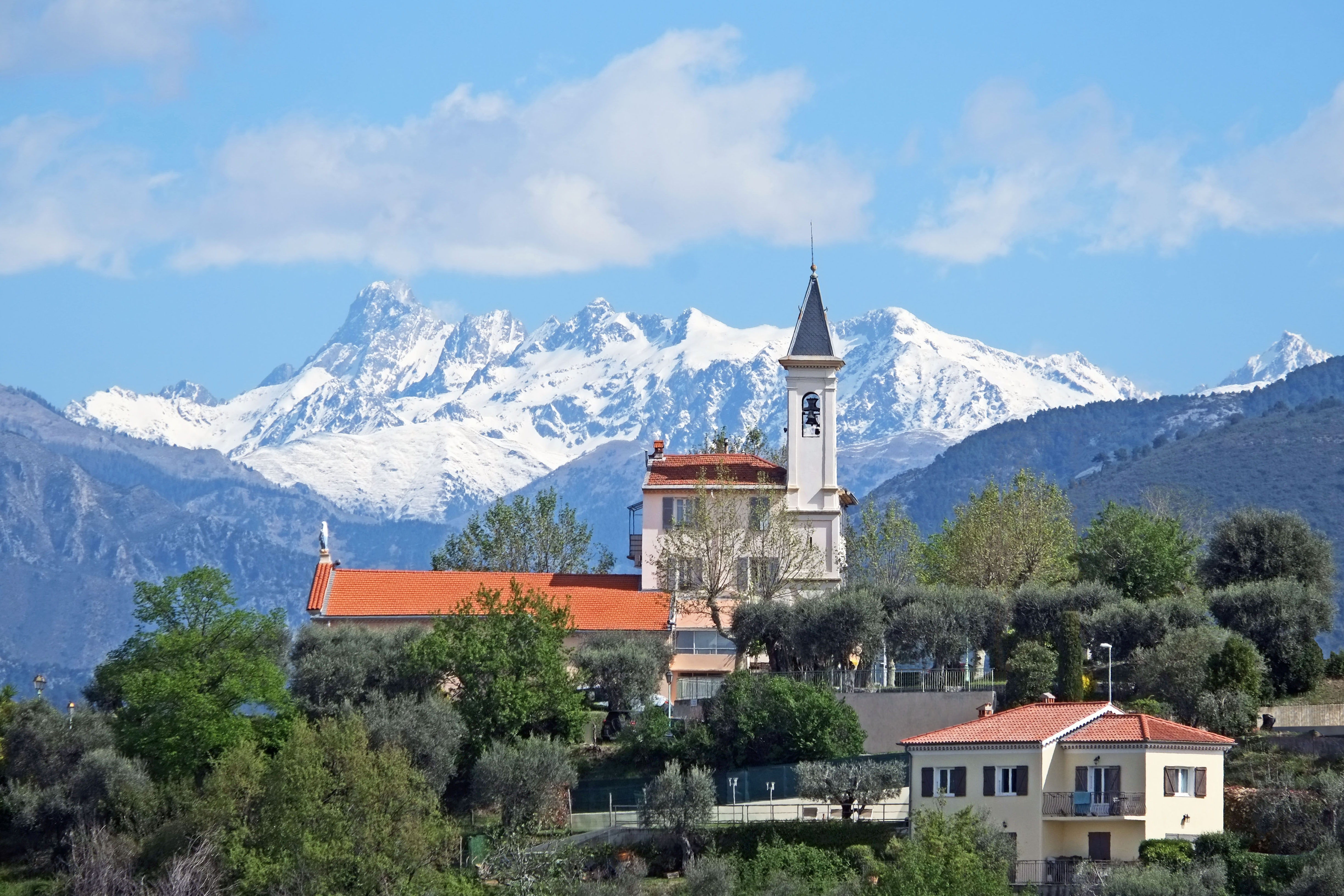 Vue de l’église Notre-Dame-de-la-Nativité de Colomars depuis la route de Nice au printemps.